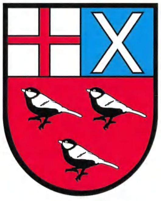 Wappen Schöndorf